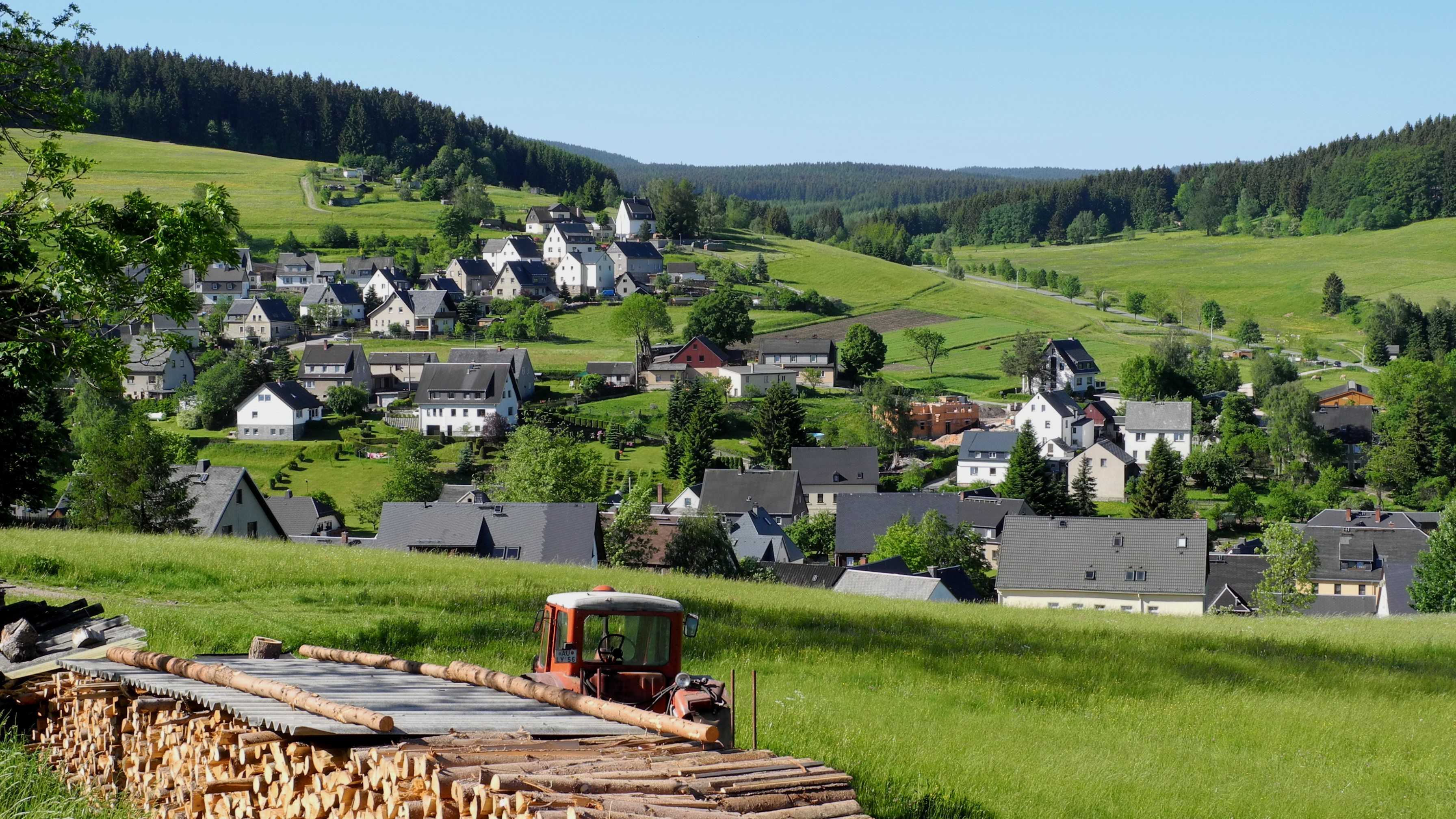 Eibenstock - Sosa von Osten